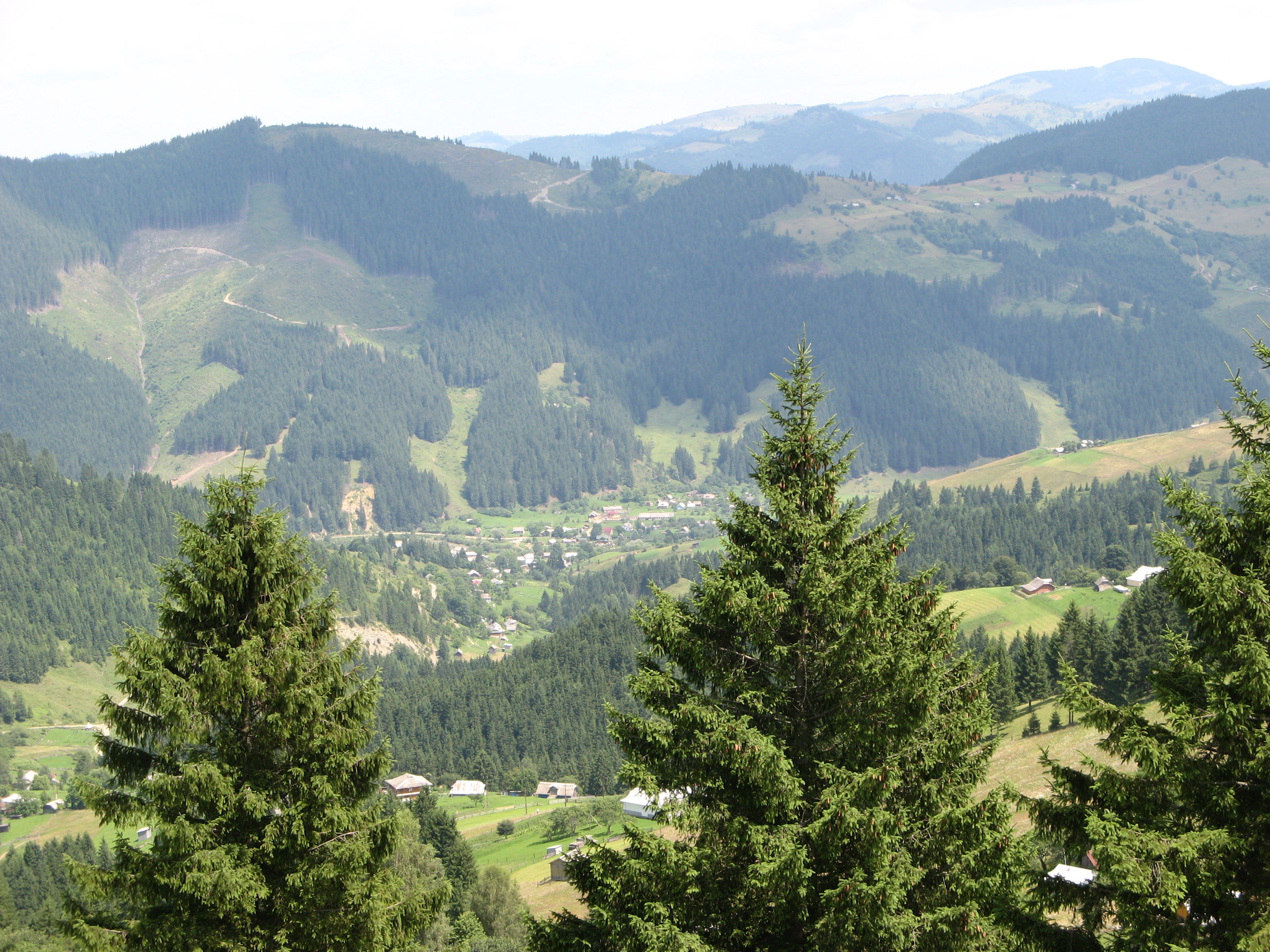 с. Стебні (Верховинський р-н)